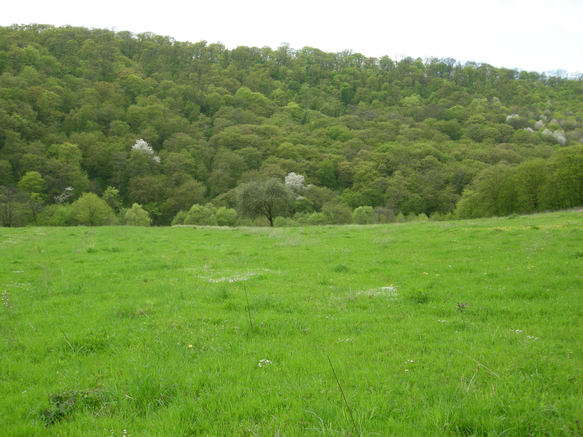 Урочище «Долина» біля села Жнибороди Бучацького району. У лісі за р. Стрипою — «Сокілецька колонія чапель» у кварталі 71 виділах 20, 21, 23, 27 лісового урочища «Язловець» Язловецького лісництва.